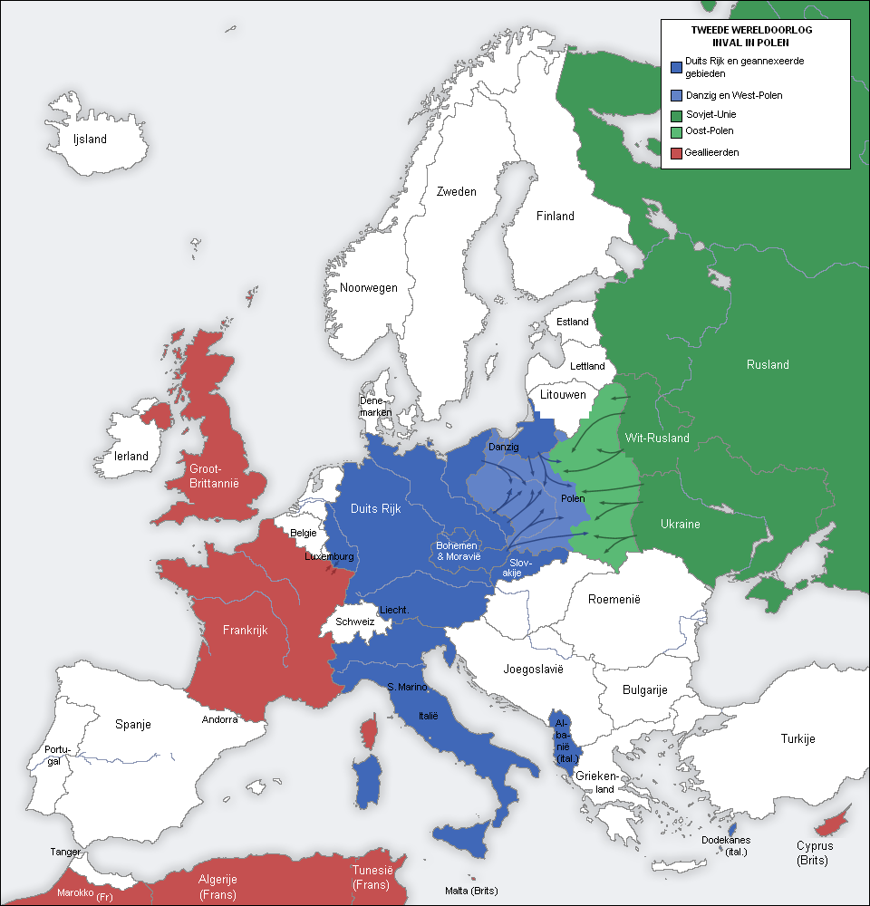 Overzicht van de landen in de Tweede_wereldoorlog na de inval in Polen (Oktober 1939) waarbij Nazi-Duitsland Polen binnenviel op 1 september 1939. De Sovjet-Unie viel Polen binnen op 17 september 1939.